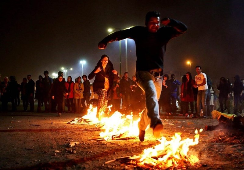 پریدن از روی آتش در جشن چهارشنبه‌سوری